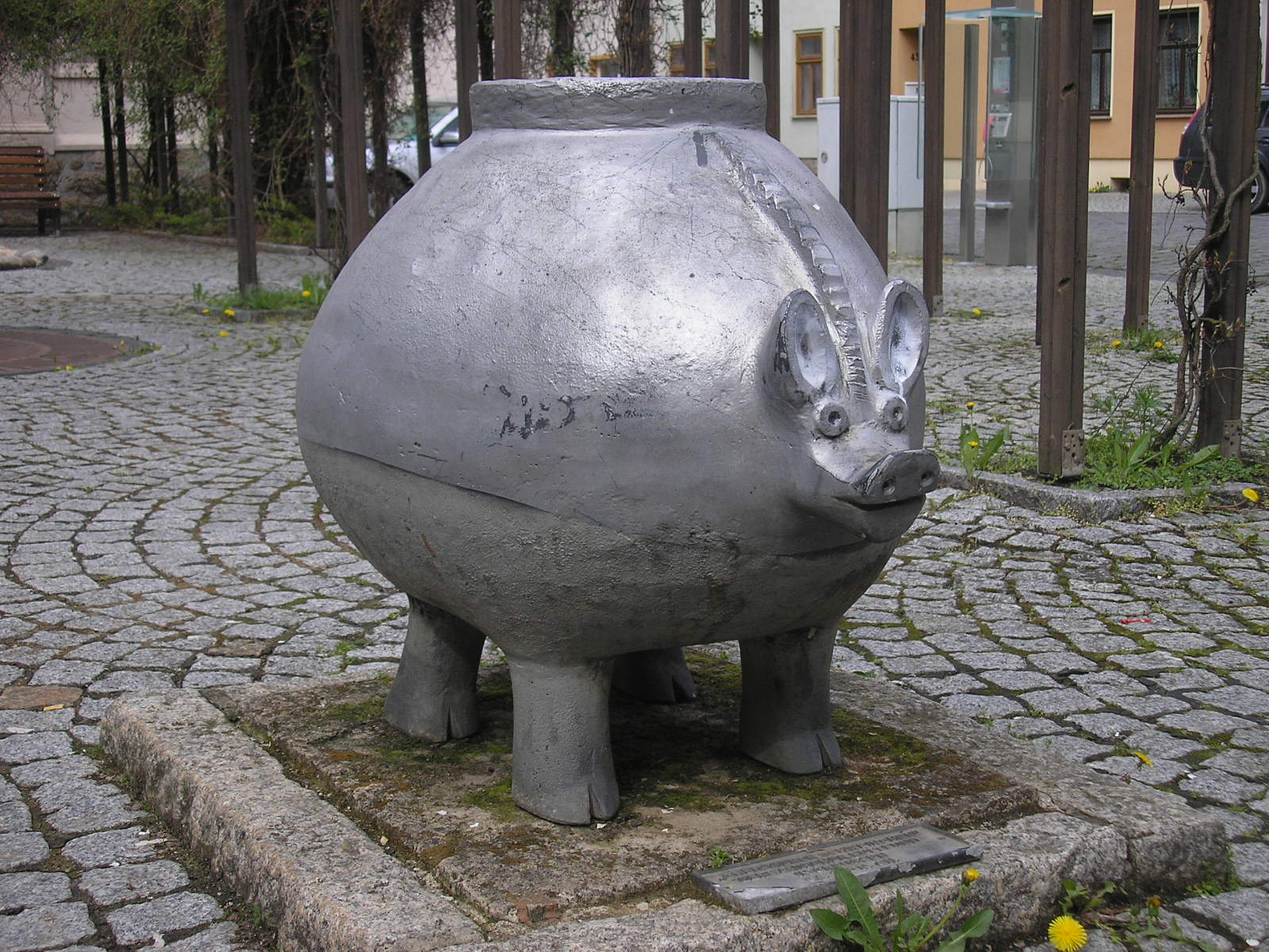 Eine Skulptur des "Greußener Schweinchens" auf dem Marktplatz von Greußen (Thüringen). Das Greußener Schweinchen ist im original ein germanischer Bodenfund aus der Zeit um 200 nach Christus.